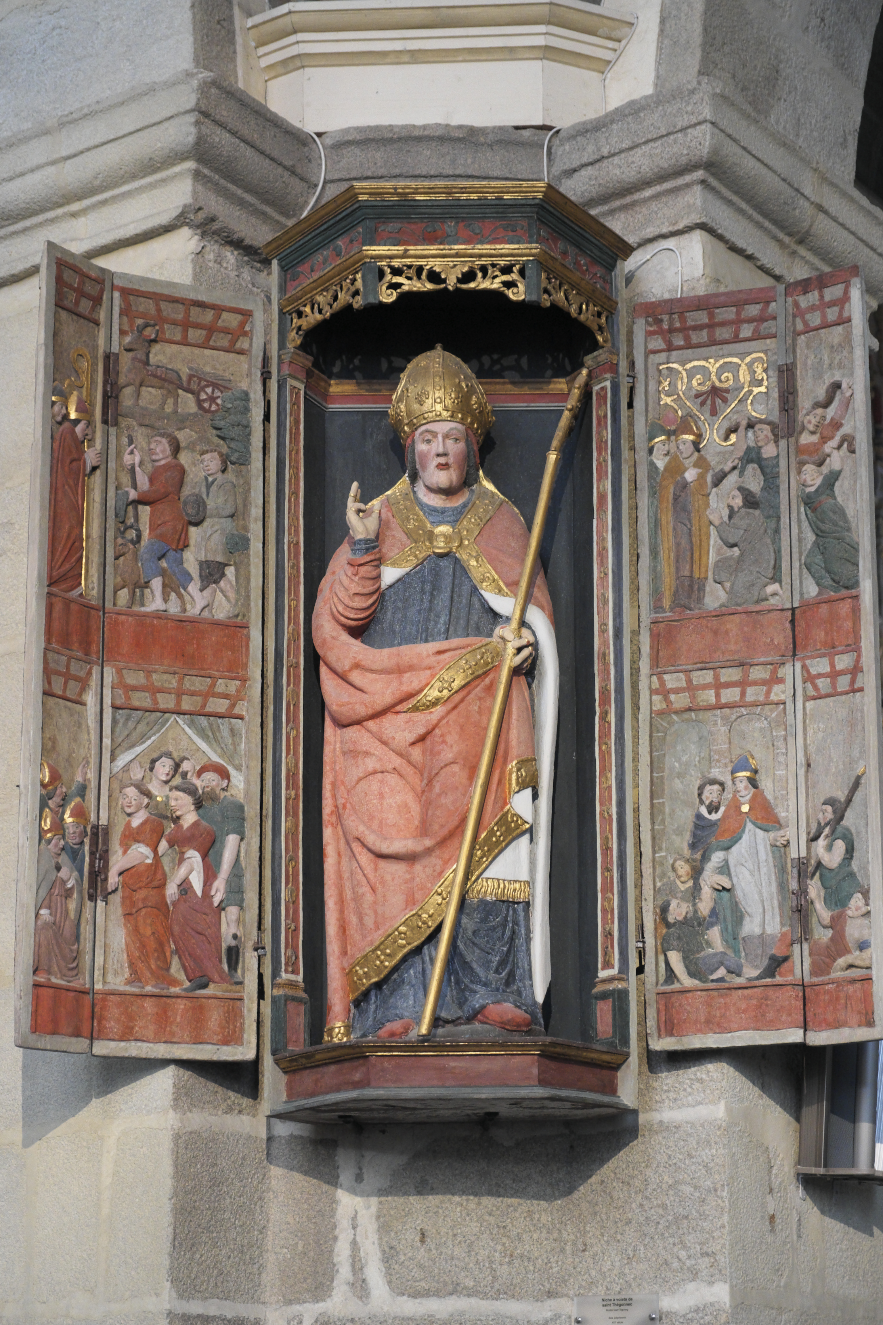 Katholische Pfarrkirche Notre-Dame in Saint-Thégonnec im Département Finistère (Region Bretagne/Frankreich), heiliger Thégonnec